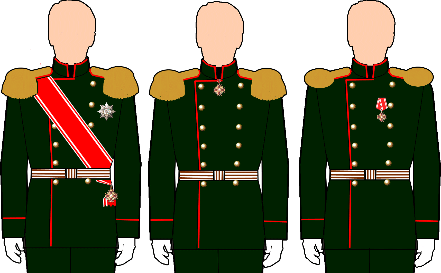 Российская империя Схема размещения орденских знаков Ордена Св. Станислава.